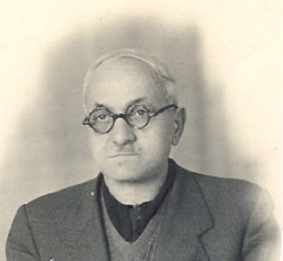 Amerindo Camilli